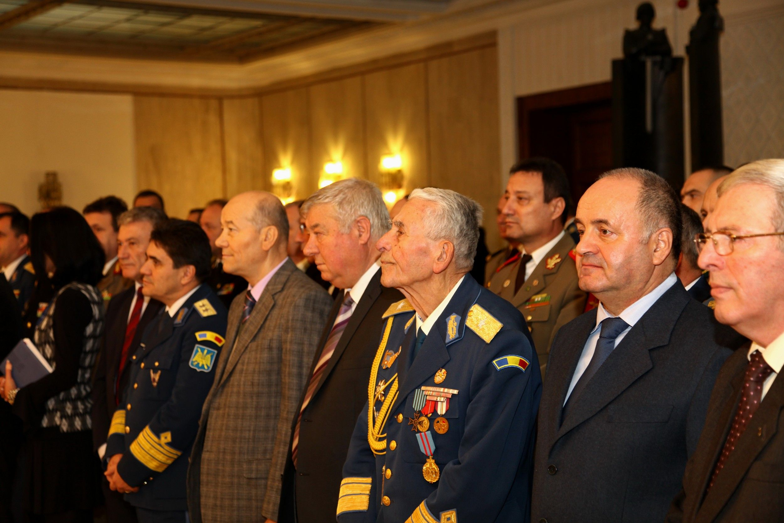 General de flotilă aeriană (rtr) Radu Theodoru, la ediţia a XVIII a premiilor revistei "Gândirea militară românească" din 11 noiembrie 2016